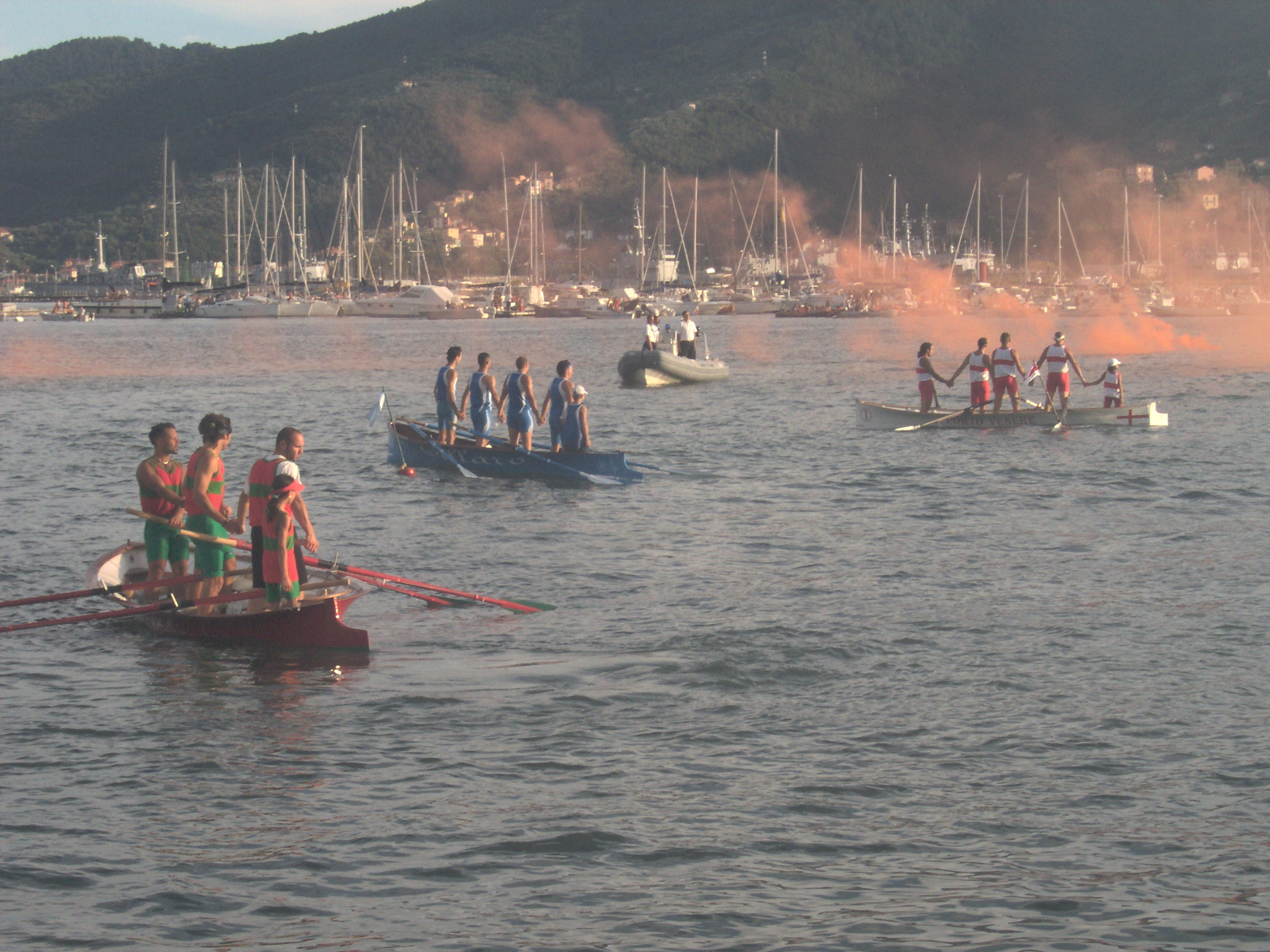 La Spezia - Festa del mare; onori ai caduti del mare